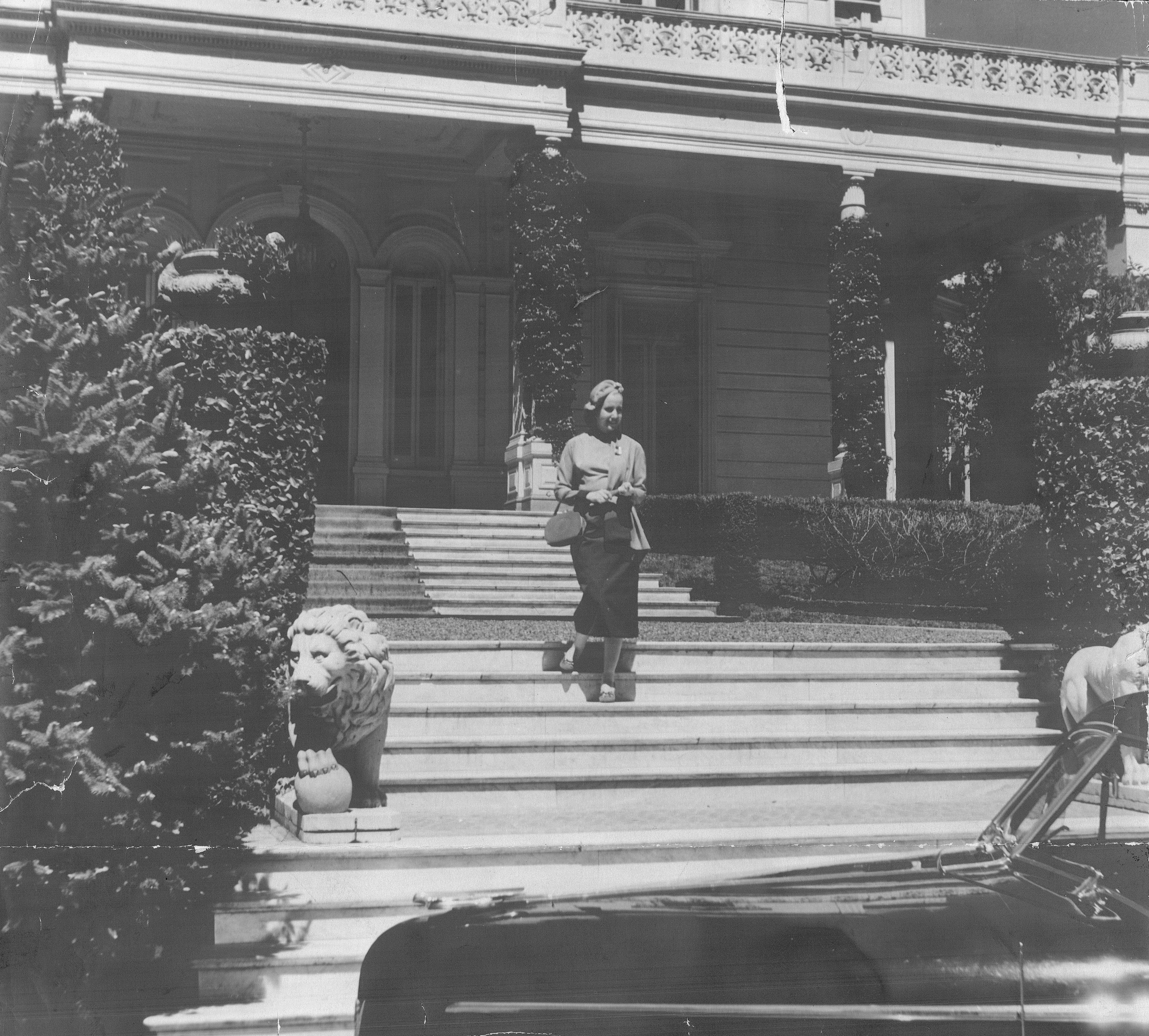 María Eva Duarte de Perón saliendo de la residencia presidencial, 1946. Inventario 194699 General Archive of the Nation Native nameArchivo General de la Nación ArgentinaParent institutionPoder Ejecutivo Nacional LocationBuenos Aires, ArgentinaCoordinates34° 36′ 17″ S, 58° 22′ 14″ W Established28 August 1821Web pageAGNAuthority control : Q2860529 VIAF: 158621023 ISNI: 0000 0001 2375 5869 LCCN: n82144709 NKC: kn20121211004 WorldCat institution QS:P195,Q2860529 This file, was provided to Wikimedia Commonsthanks to an agreement between the General Archive of the Nation of Argentina and Wikimedia Argentina.